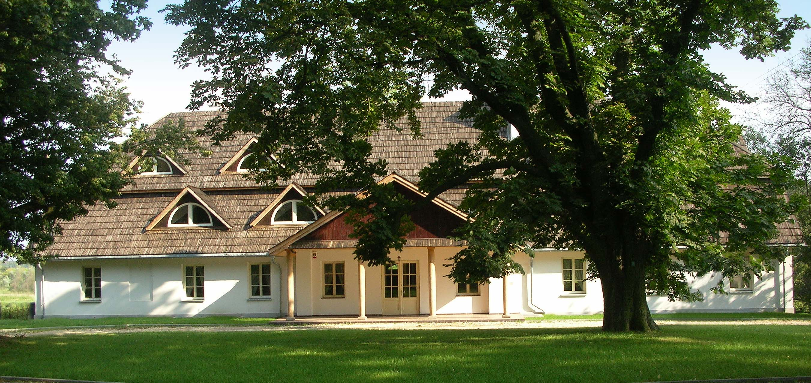 Strzyżew, dwór, XVIII